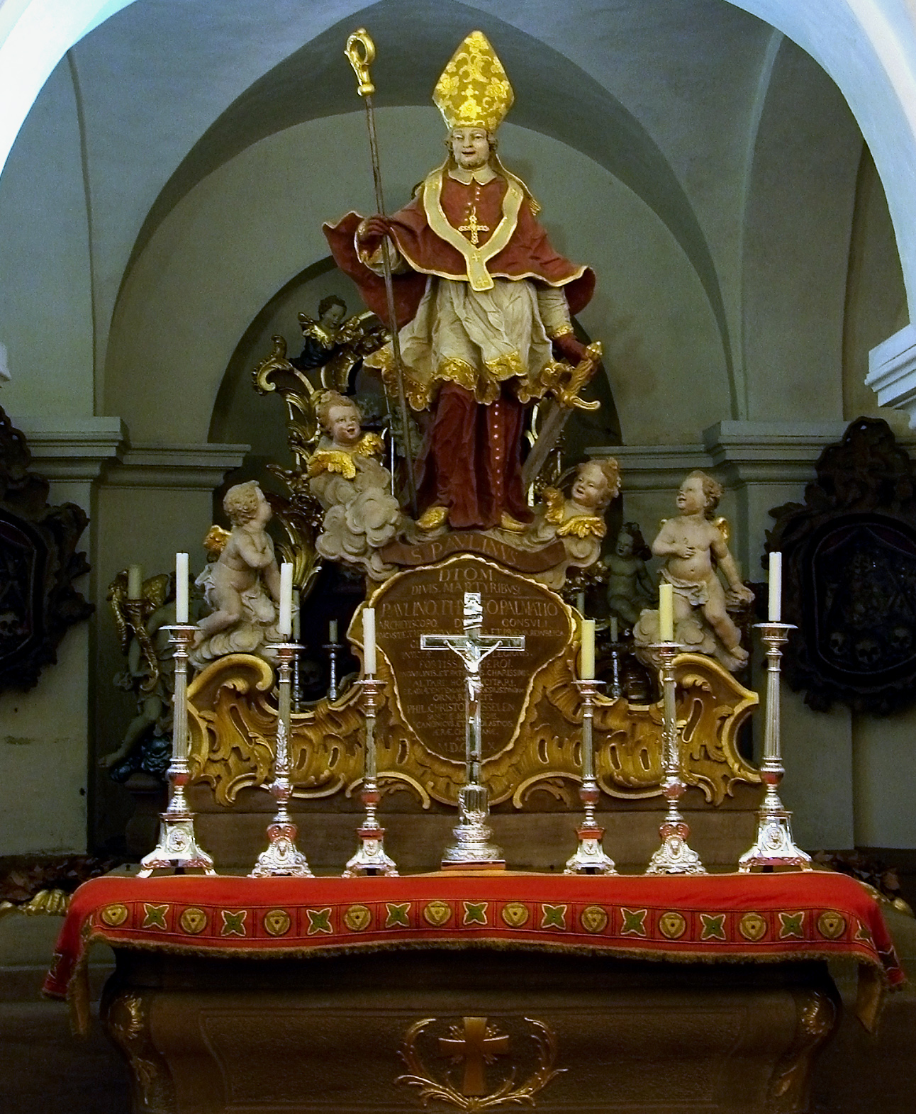 Statue de Saint Paulin dans la crypte de l'église Saint-Paulin à Trèves.